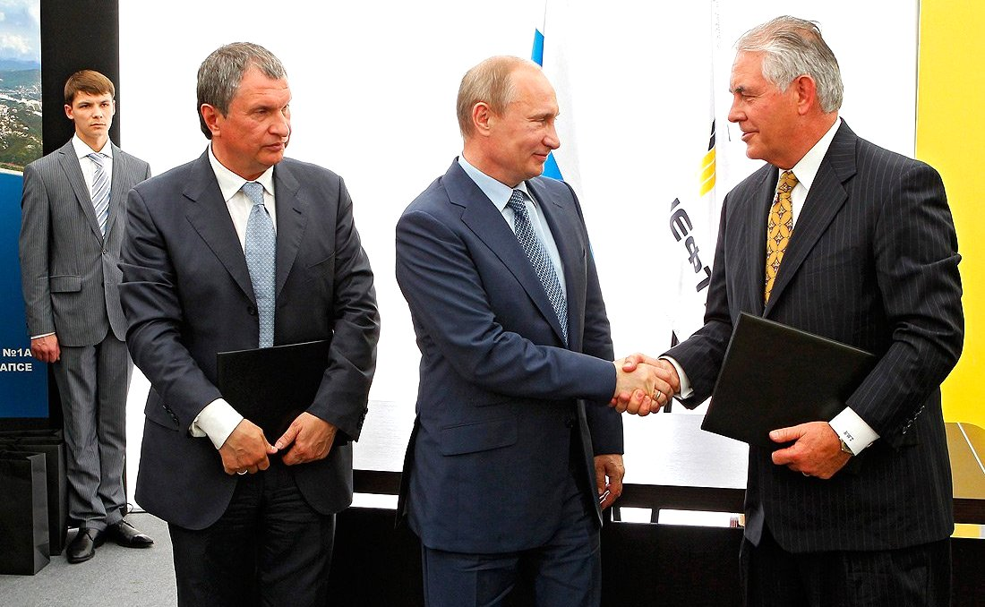 В присутствии Владимира Путина президент, председатель правления компании «Роснефть» Игорь Сечин (слева) и председатель Совета директоров компании «ExxonMobil» Рекс Тиллерсон подписали соглашение о совместной разработке трудноизвлекаемых запасов в Западной Сибири